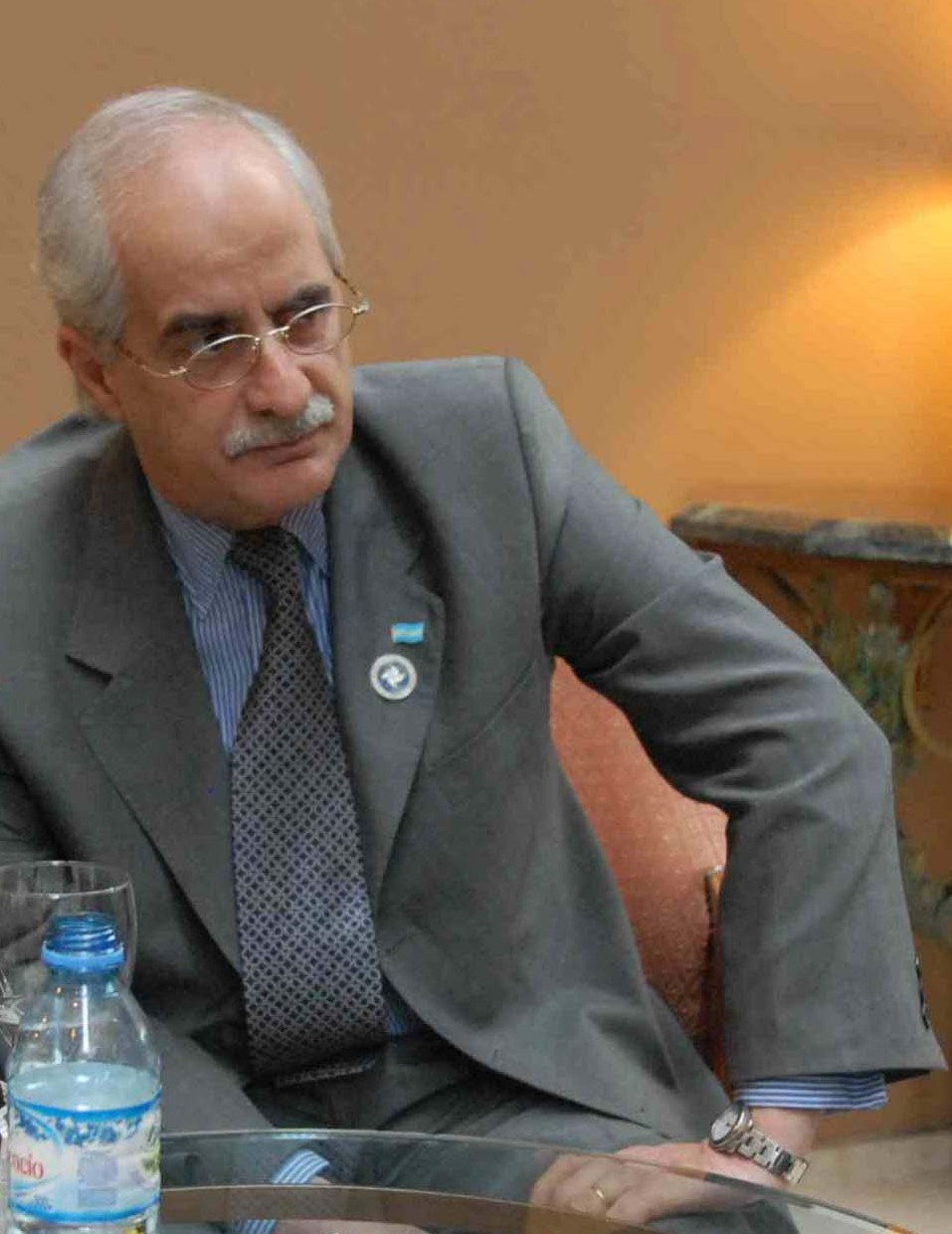 Jorge Taiana, ministro de Relaciones Exteriores, Comercio Internacional y Culto de la República Argentina